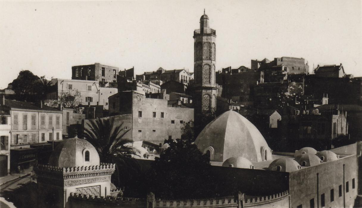 Oran (Algérie). La mosquée du Pacha vers 1920.